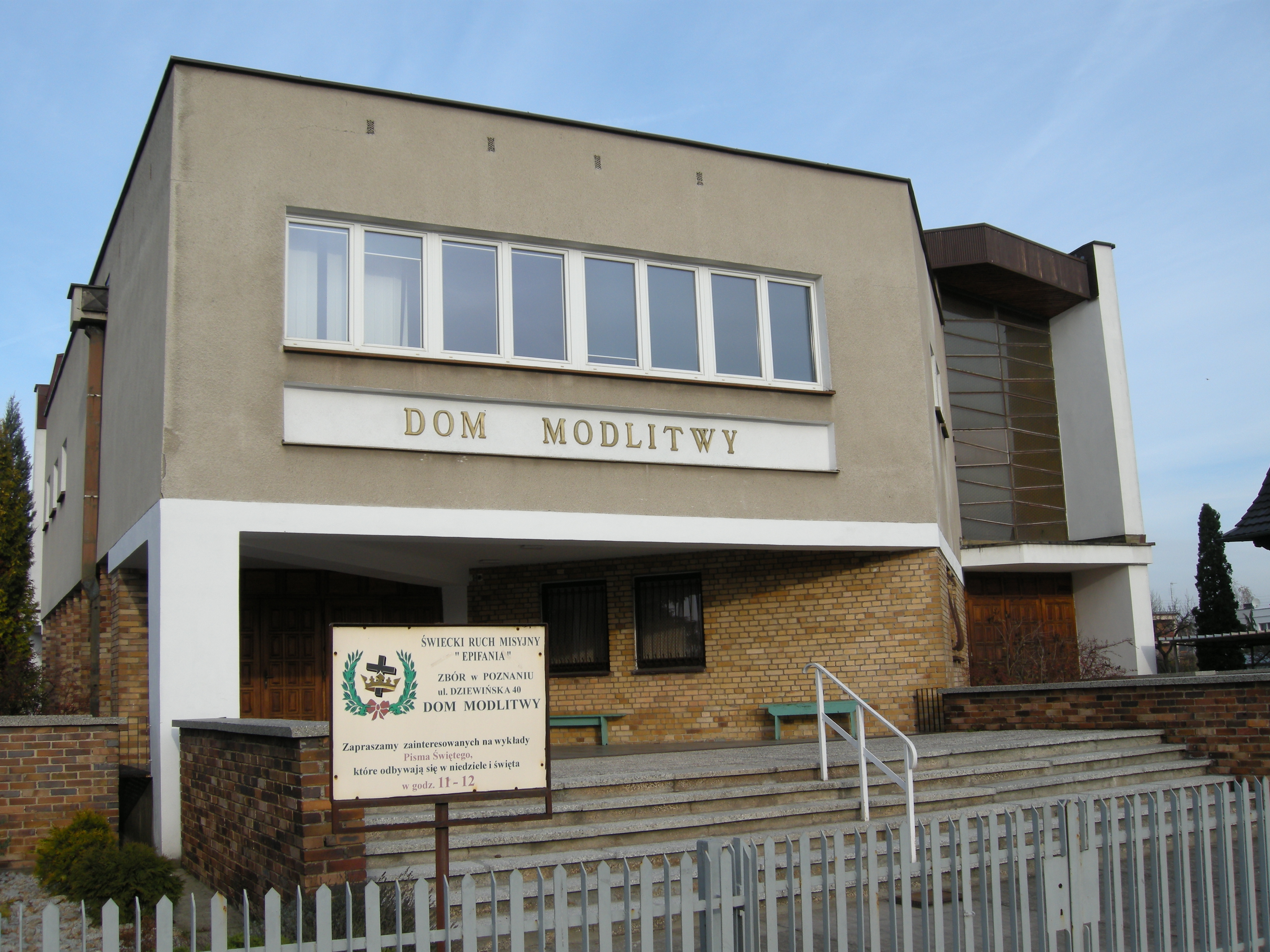 Dom modlitwy. Świecki ruch misyjny "Epifania". Poznań. Polska.